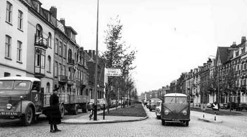 Zicht vanuit het zuiden op de Wilhelminasingel (met klinkerbestrating) in Maastricht in 1958. Fotocollectie RHCL Maastricht, GAM 1515.